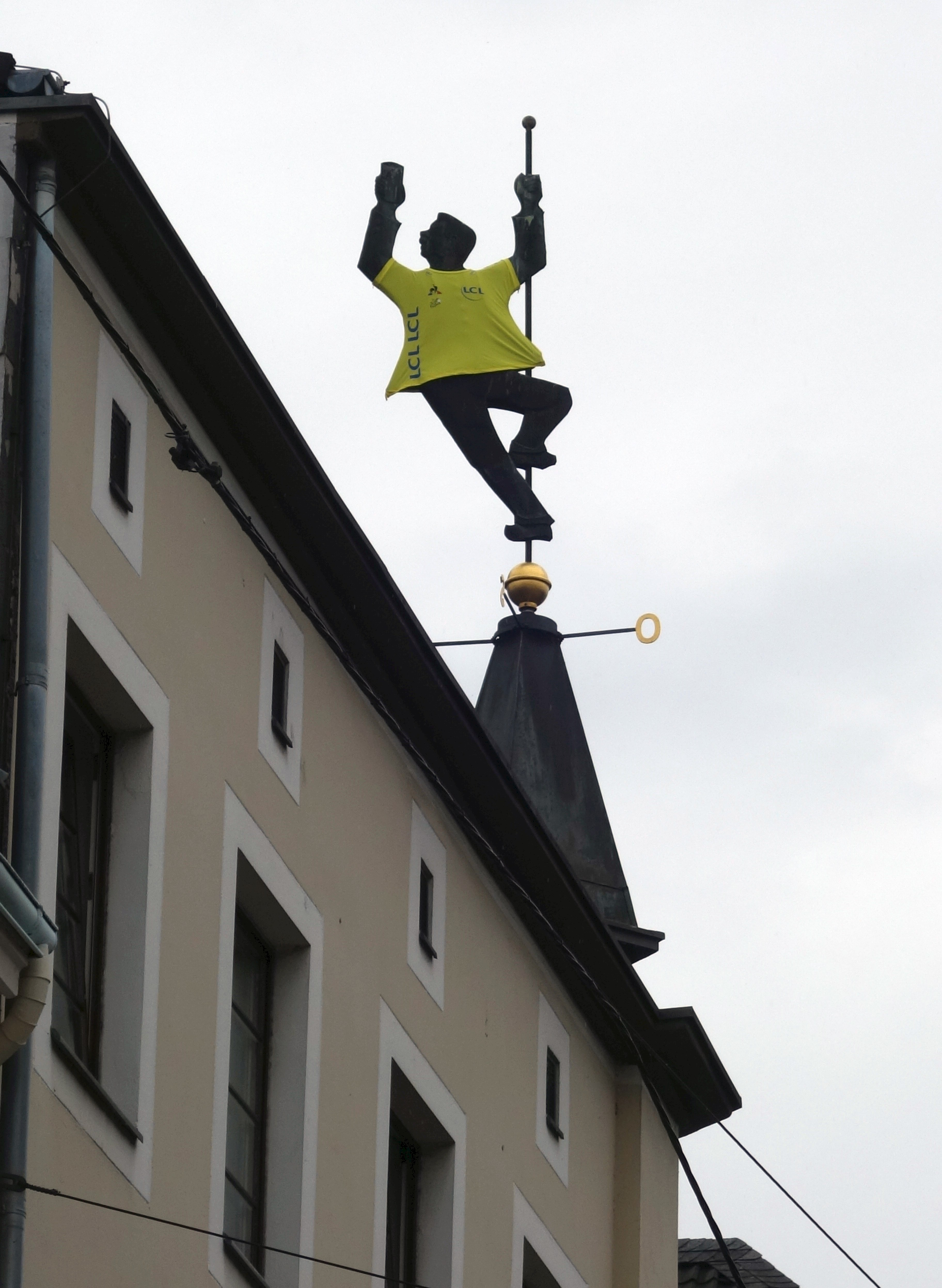 Düsseldorf, Uerige. Hauszeichen mit gelbem Tour-Tricot, anlässlich des Starts der Tour de France in Düsseldorf im Juli 2017.